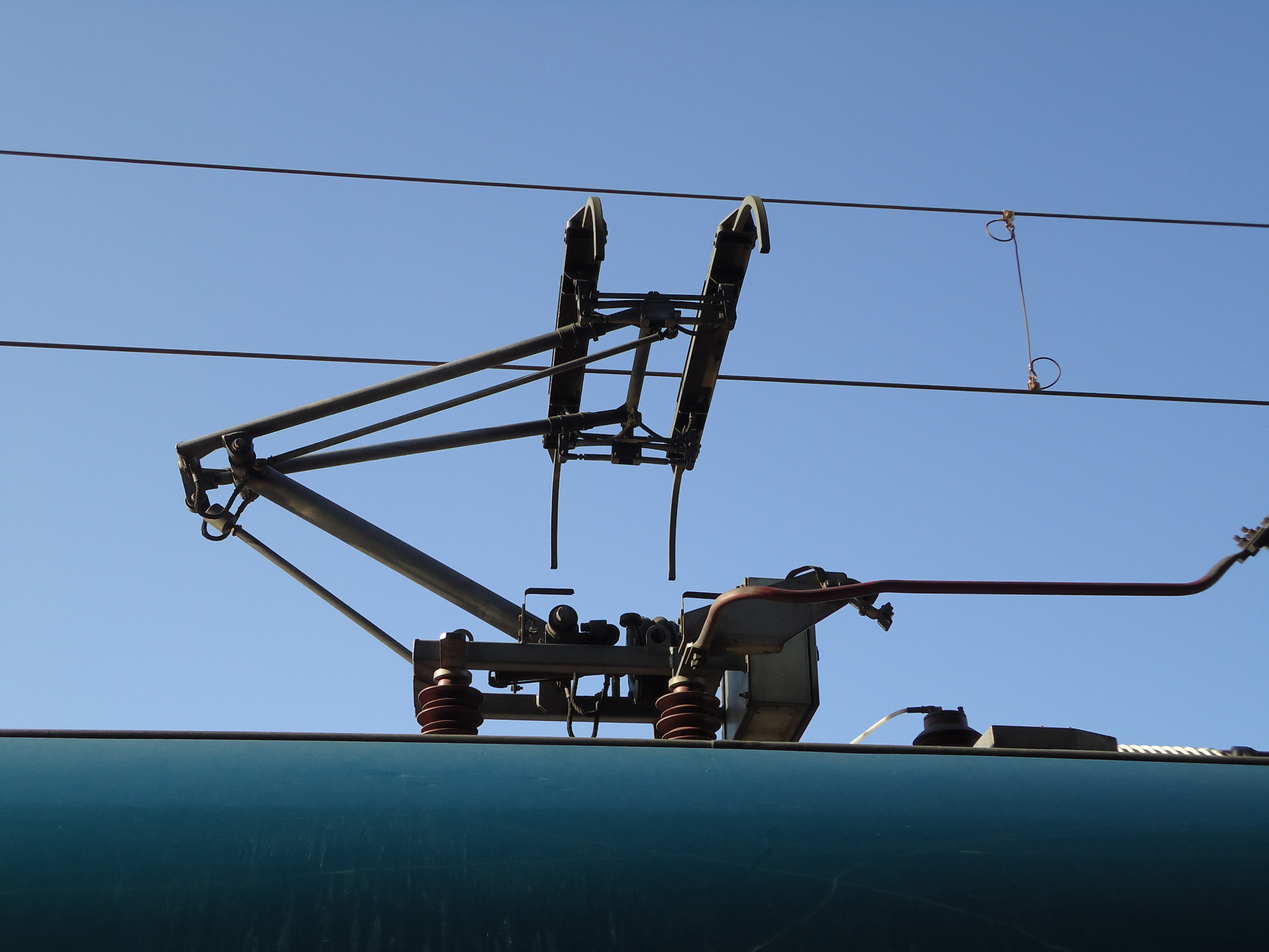 누리로에서 쓰이고 있는 싱글암 팬터그래프 편 모습